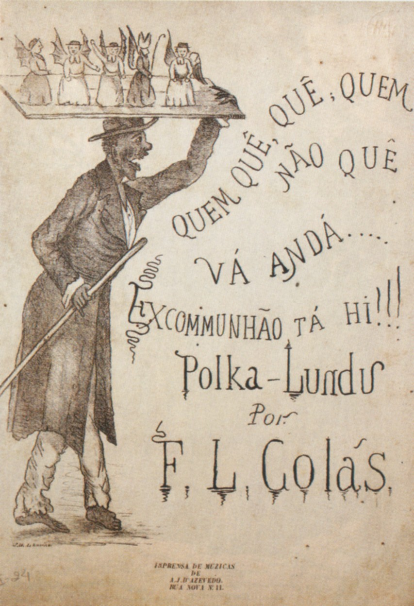 Capa de partitura de lundu, Pernambuco, Brazil